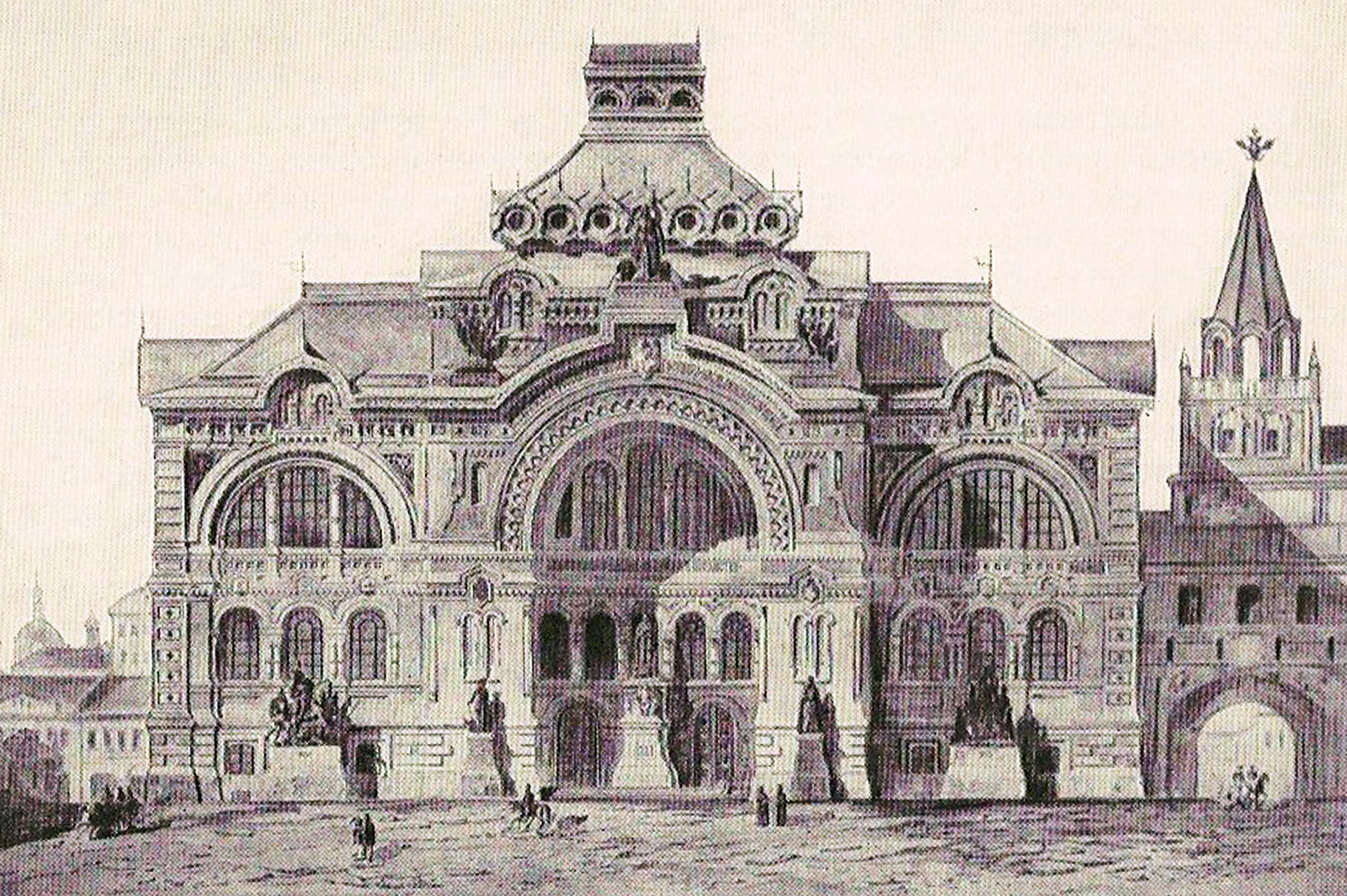 Проект Исторического музея (Ф. Шехтель, 1875 г.)